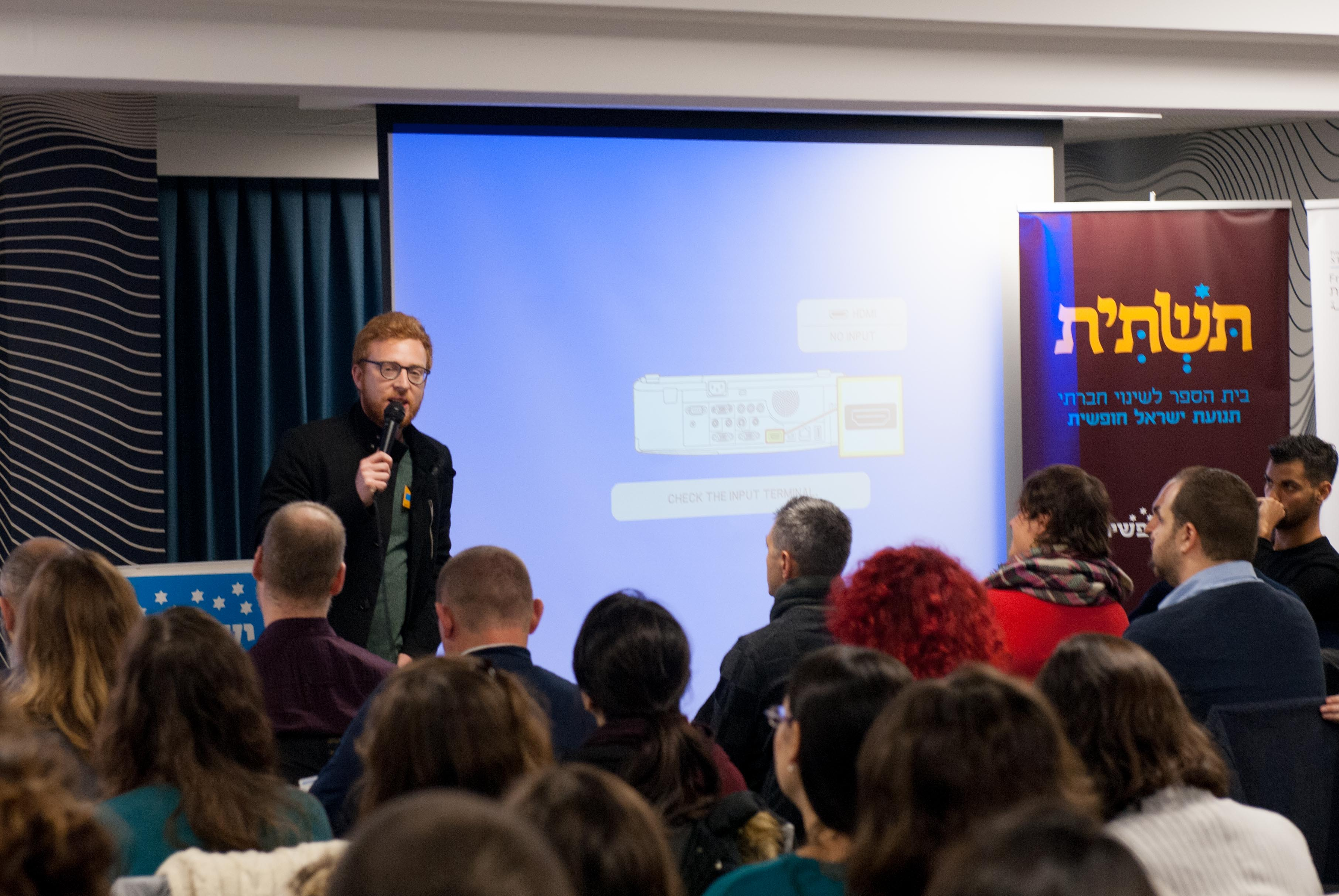 הרצאה למשתתפי קורס תשתית